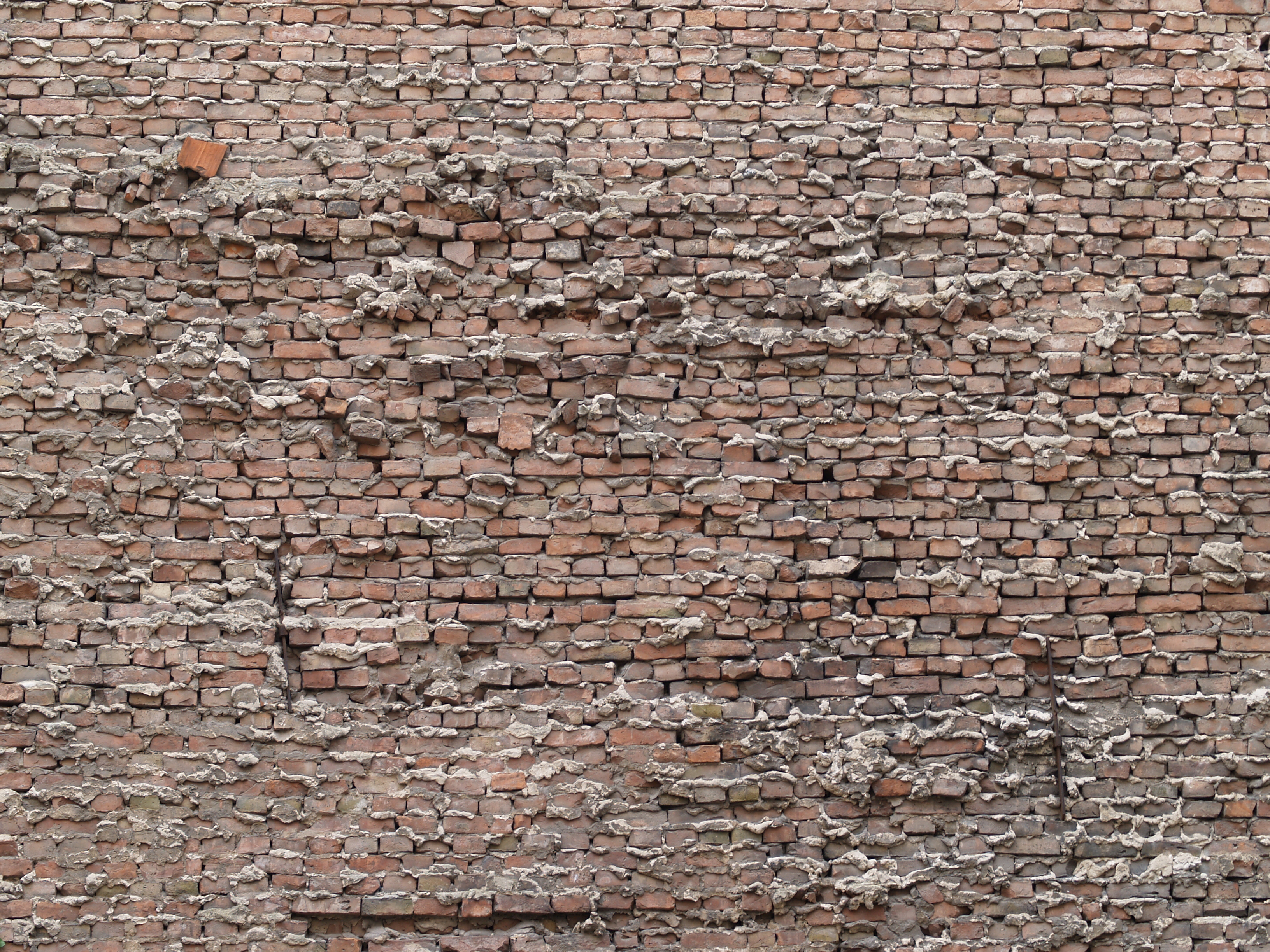 Bricks in a wall, seen in Berlin (Germany)